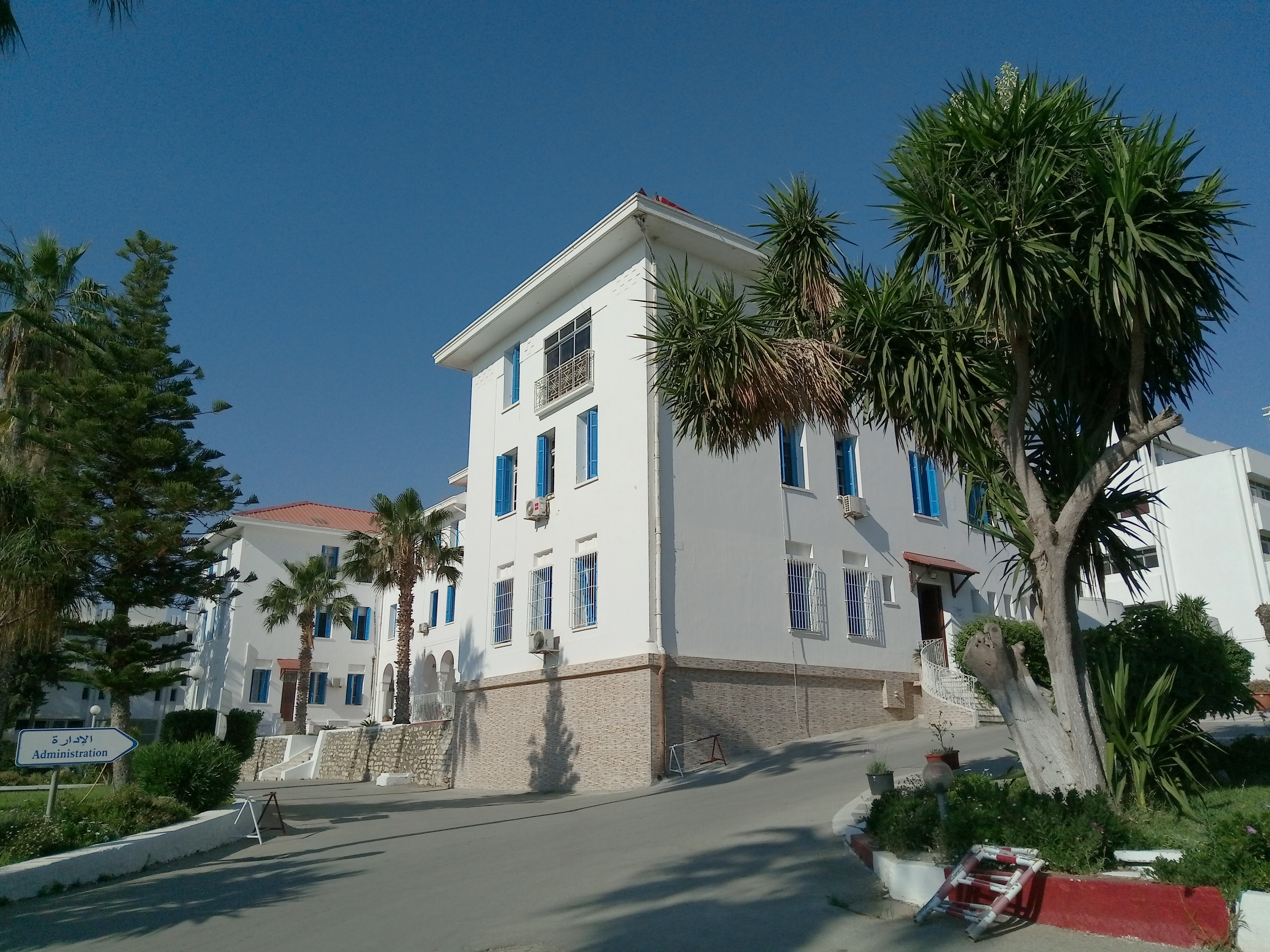 Le bâtiment administratif de l'Ecole nationale d'administration de Tunis, vu depuis l'entrée de la rue du docteur Calmette.